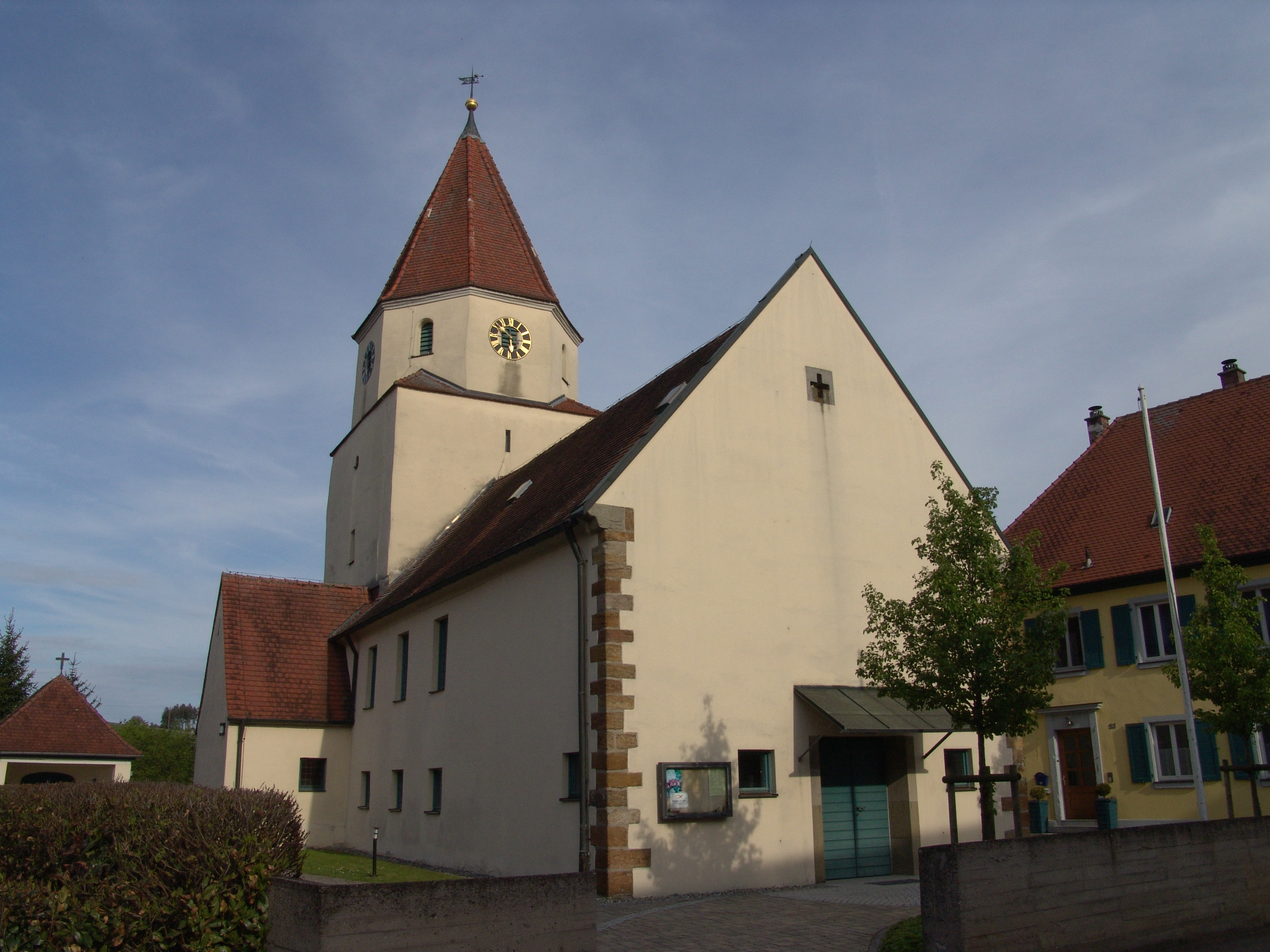 evang.-luth. Kirche St. Bartholomäus in Frankenhofen